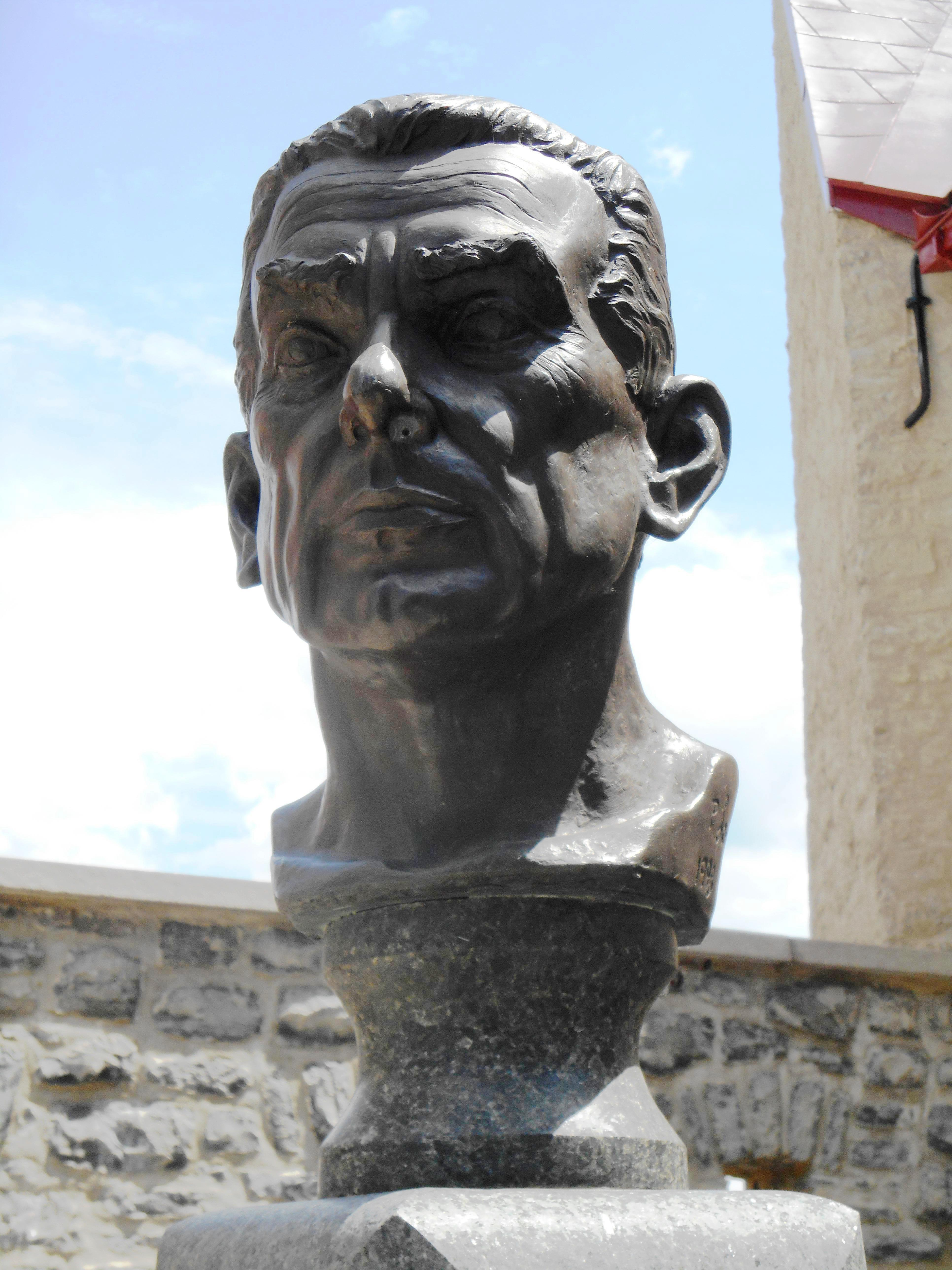 Le monument de Jean-Paul Lemieux, à Québec, est situé en face du 64, côte de la Montagne, à proximité de l'Escalier Casse-Cou. Sur la plaque, est gravé : « La Ville de Québec rend hommage à l'un de ses fils Le peintre Jean-Paul Lemieux (1904-1990) Contribuant ainsi à rappeler à la mémoire des Québécois et des Québécoises ce grand artiste de réputation internationale. Elle remercie ceux qui ont permis la réalisation de ce buste, une oeuvre de l'artiste Paul Lancz. Inauguration le 12 novembre 1999. »